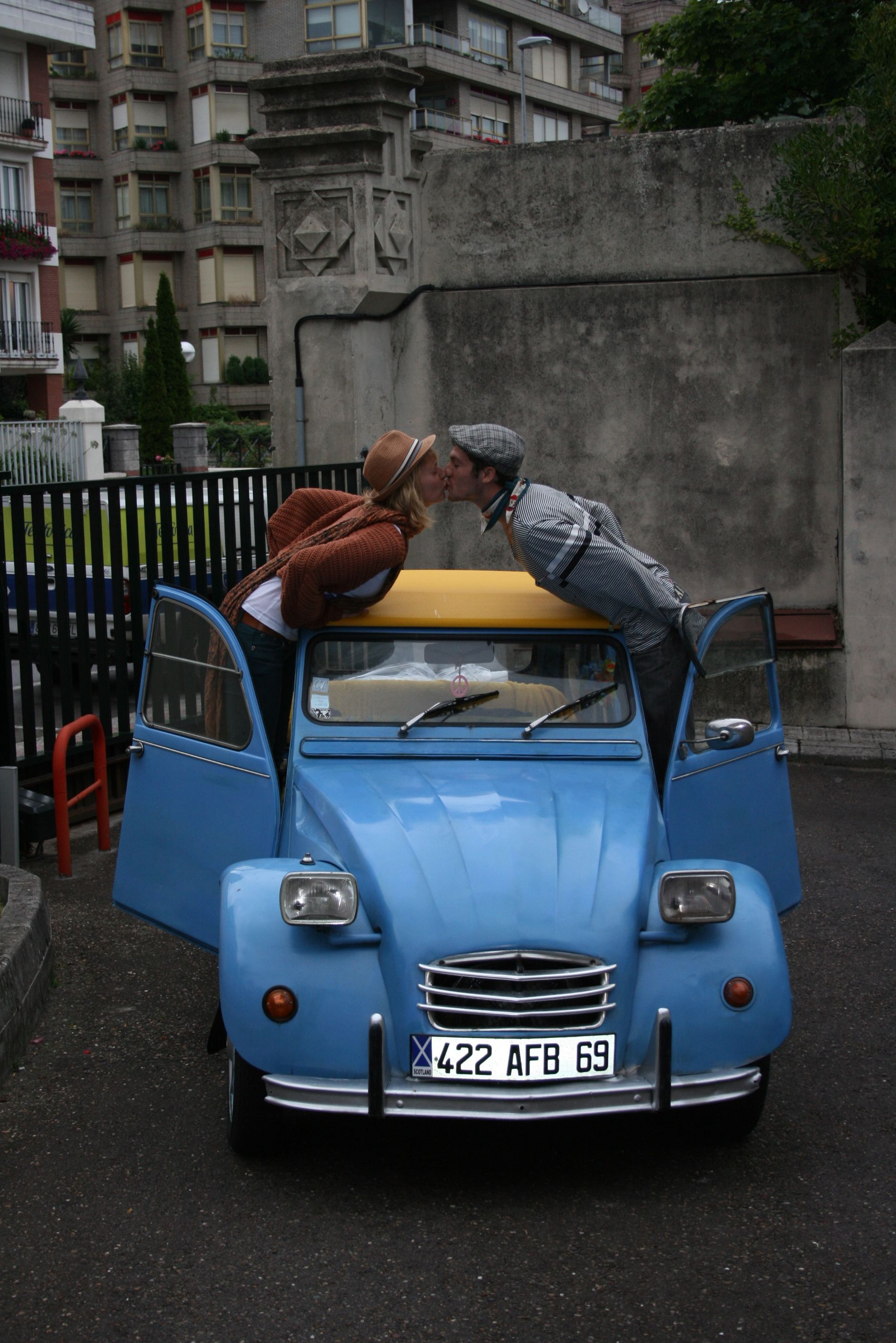 La jeunesse en vacances, l'aventure et le bonheur en 2cv.